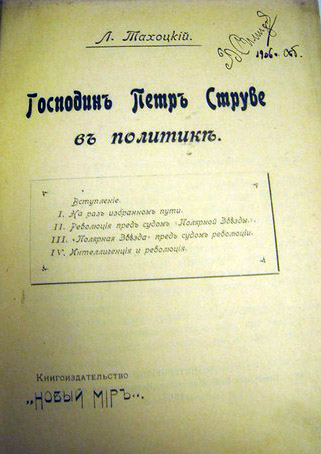 Таховский [Троцкий] - Господин Петр Струве в политике (1906, обложка)